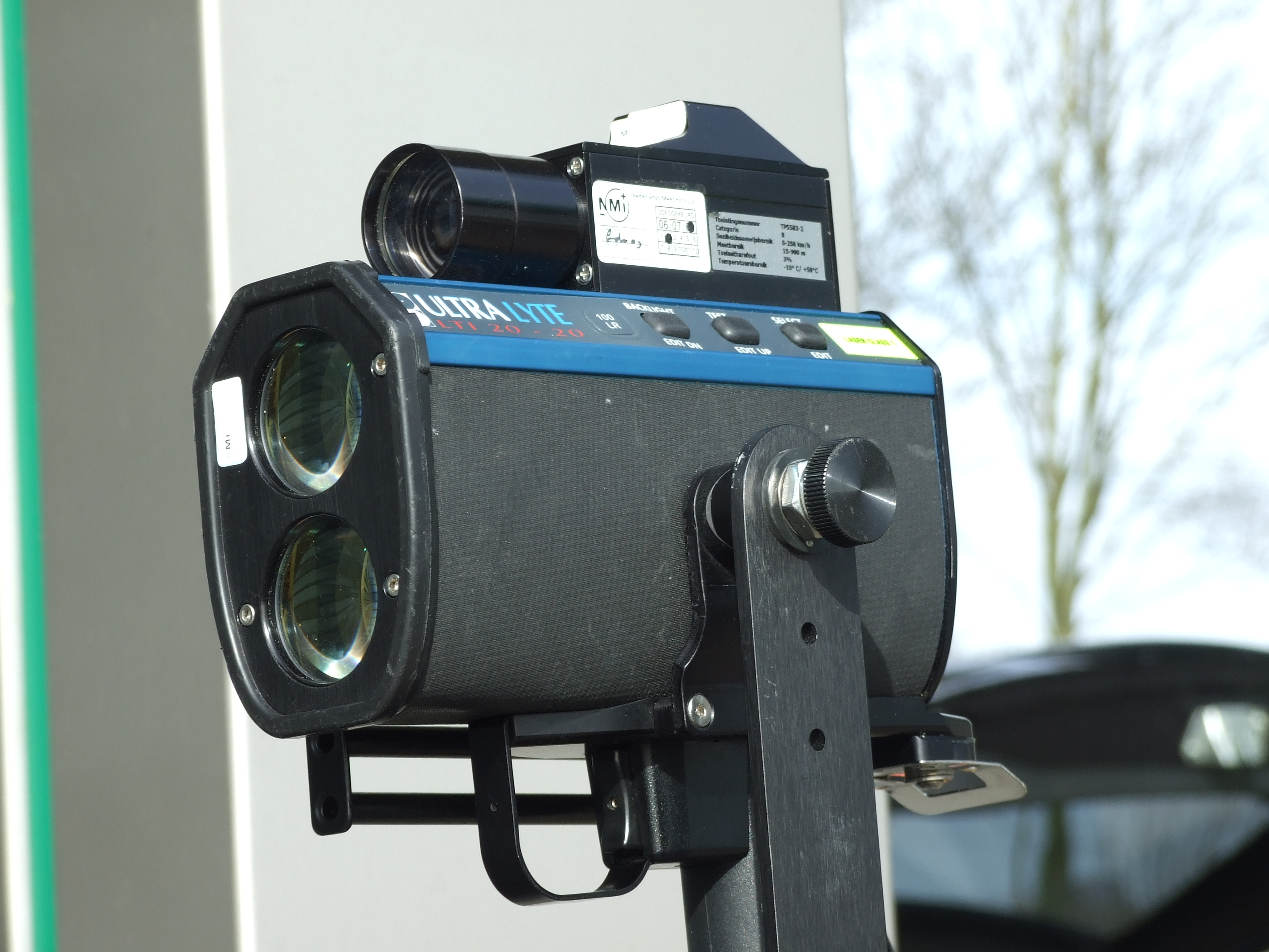 Foto van een lasergun UltraLyte LTI 20-20